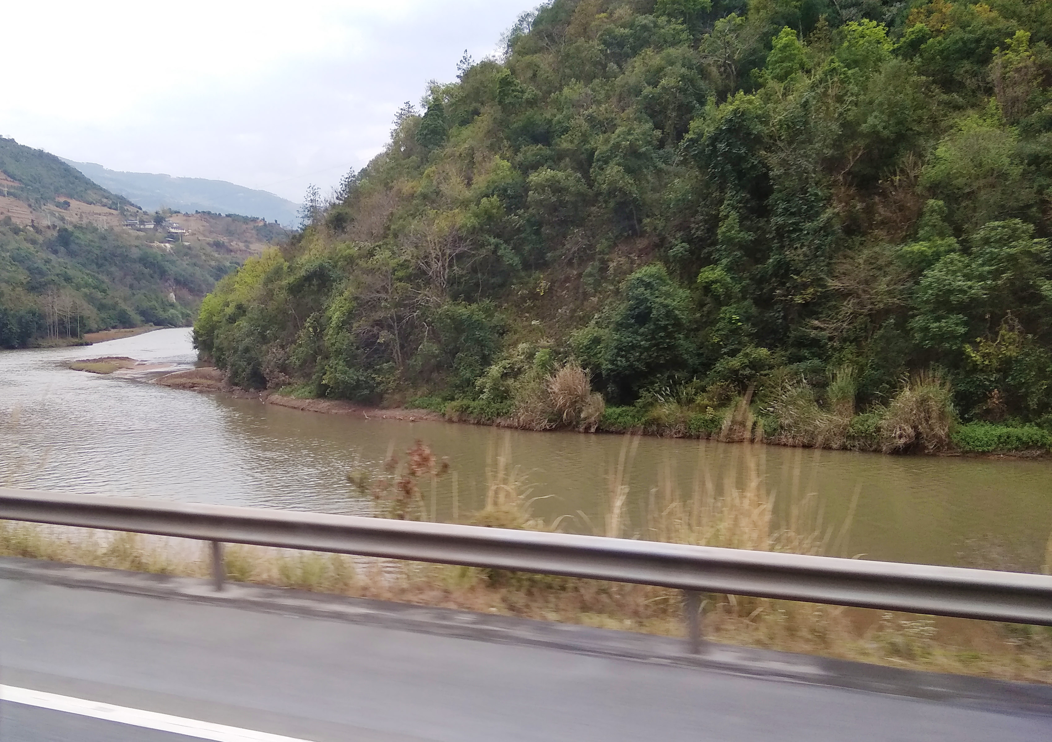 顺濞河汇入漾濞江河口处，位于中国云南省漾濞县南部顺濞乡以东，拍摄于杭瑞高速上，面向南。